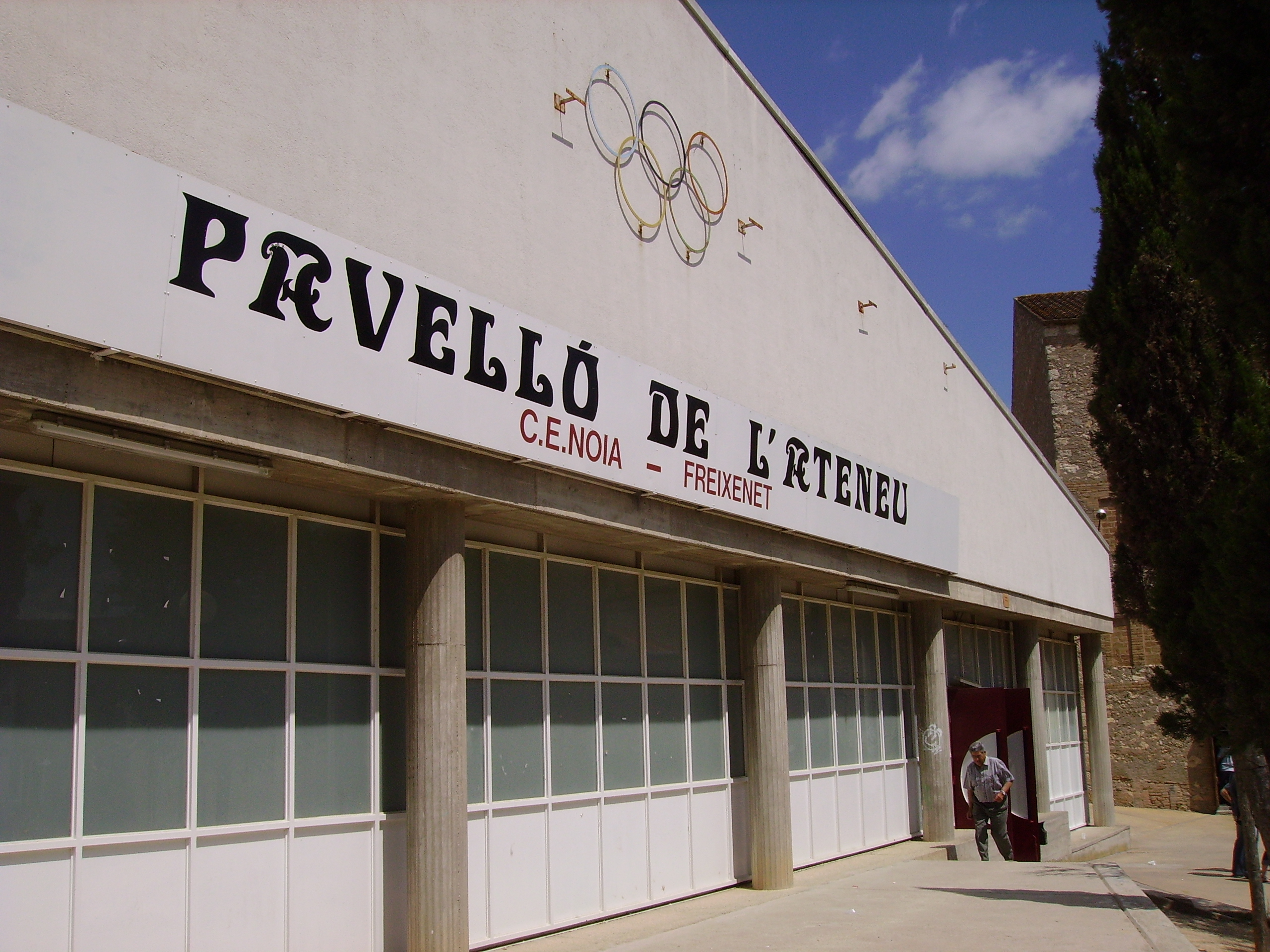 Pavelló de l'Ateneu (CE Noia), Sant Sadurní d'Anoia, Catalunya.